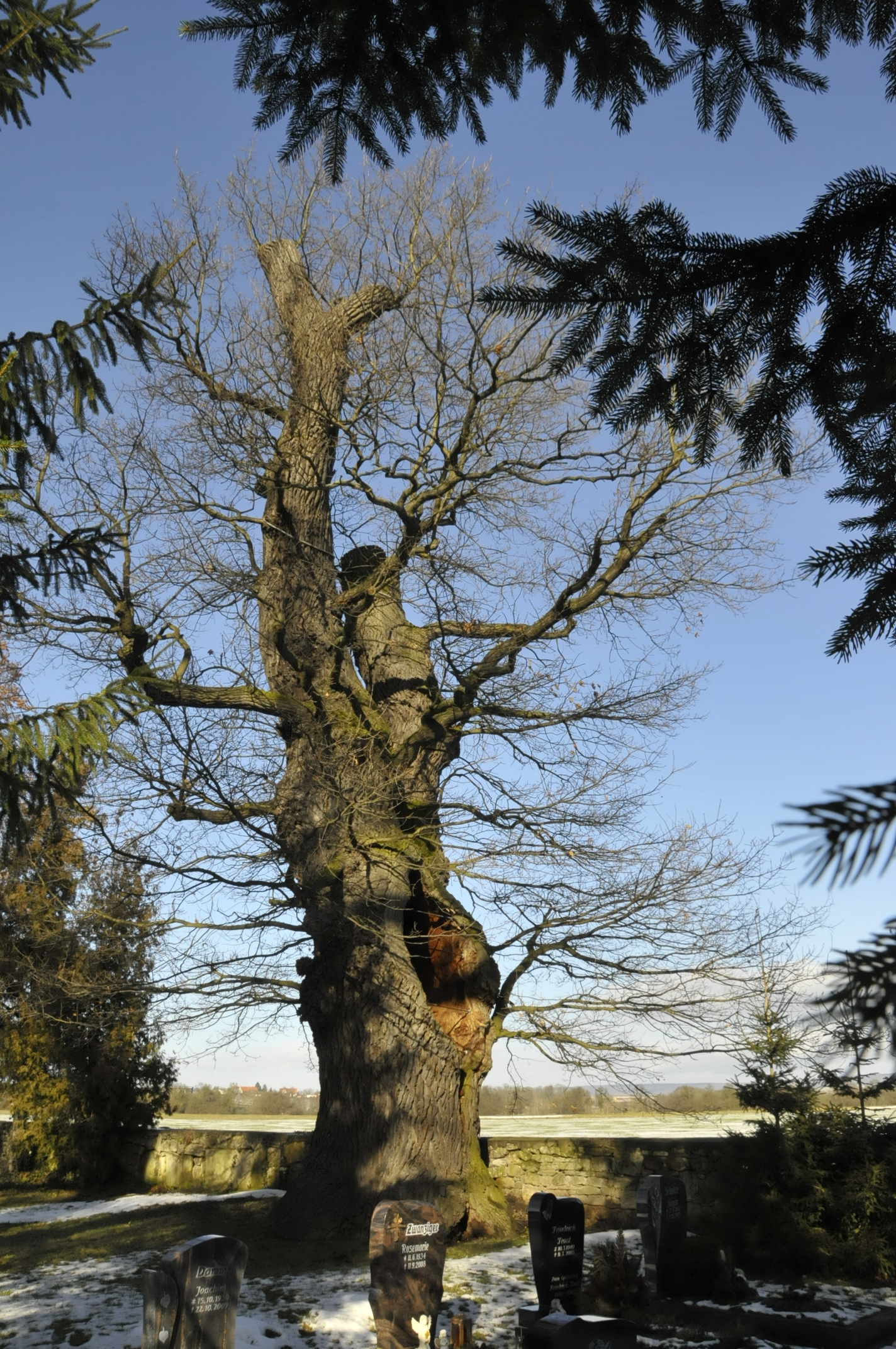 Waltersdorf (Weißensee), Friedhof mit alter Eiche